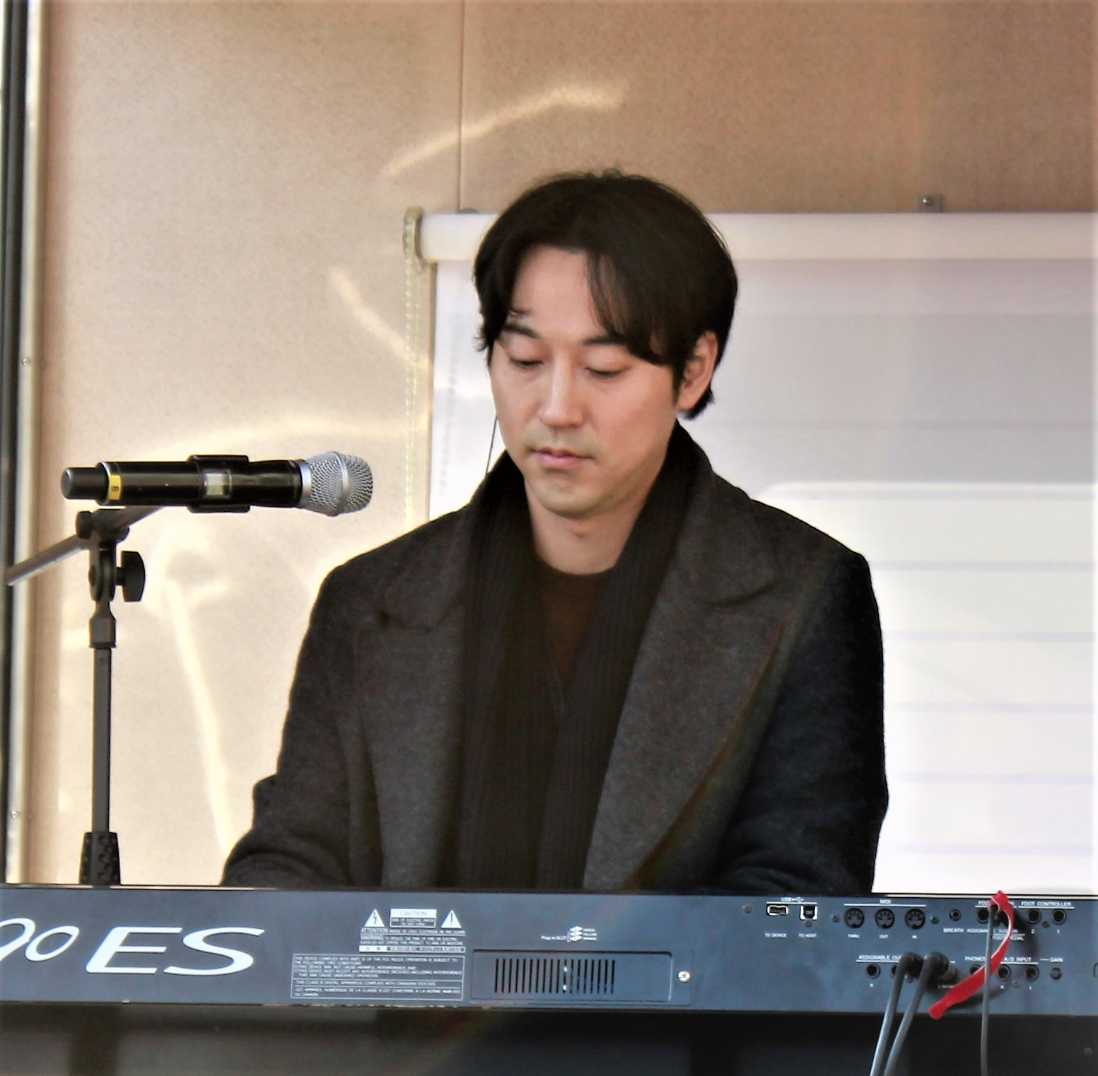 2017년 자신의 라디오 '골든 디스크'의 공개방송에서 연주하는 이루마